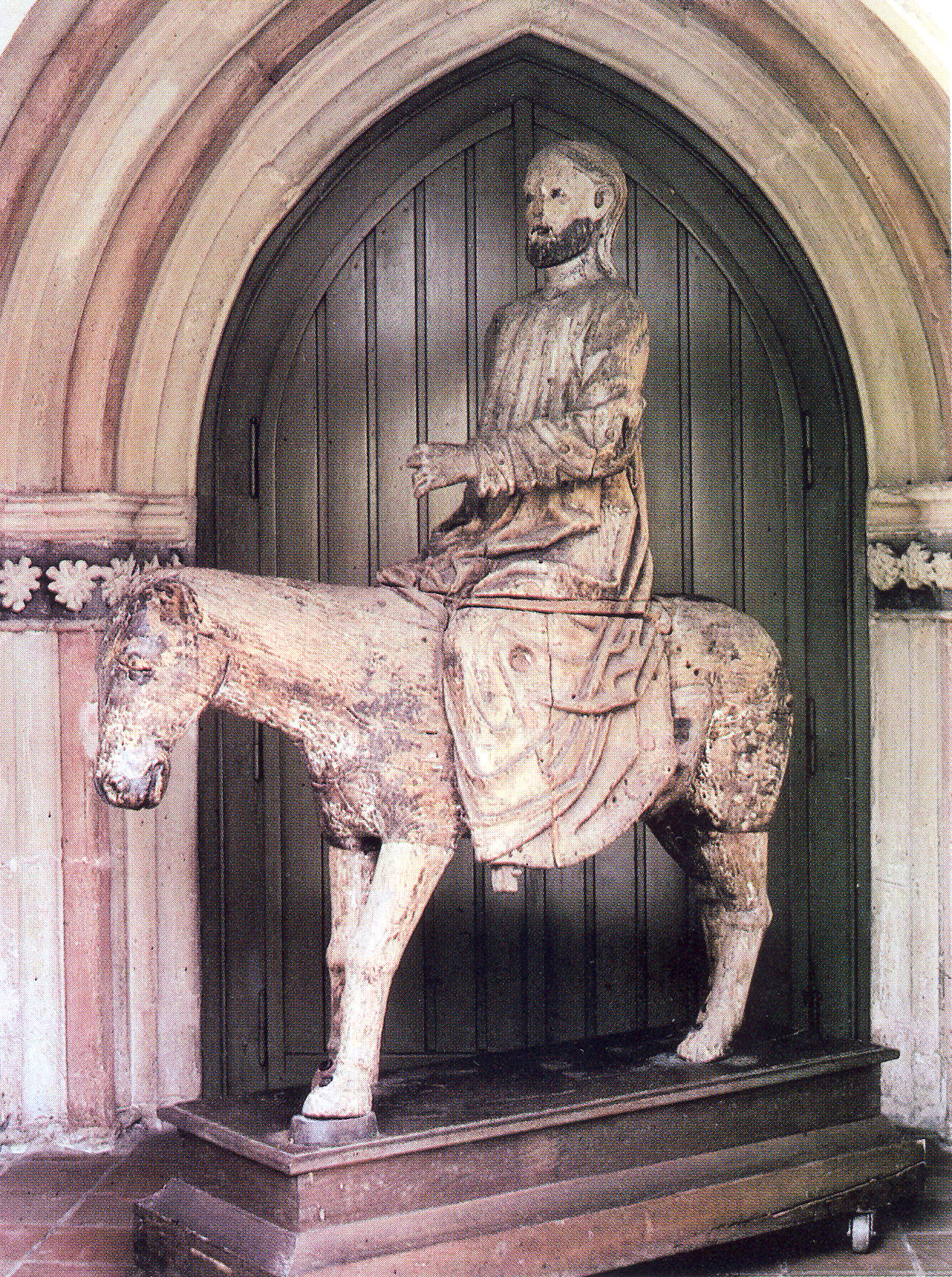 Palmesel St. Sylvester, Quakenbrück